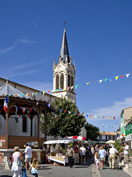 Rue principale, le kiosque à musique et l'église de La Couarde - Île de Ré - Photo issue de ma banque d'images